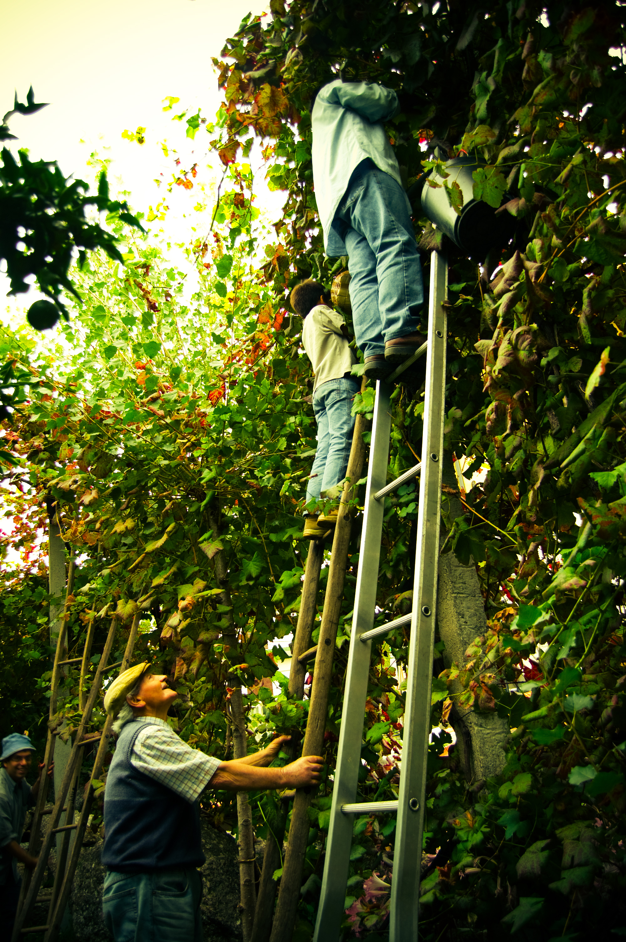 Vindimadores em vinha de enforcado, em Guimarães.